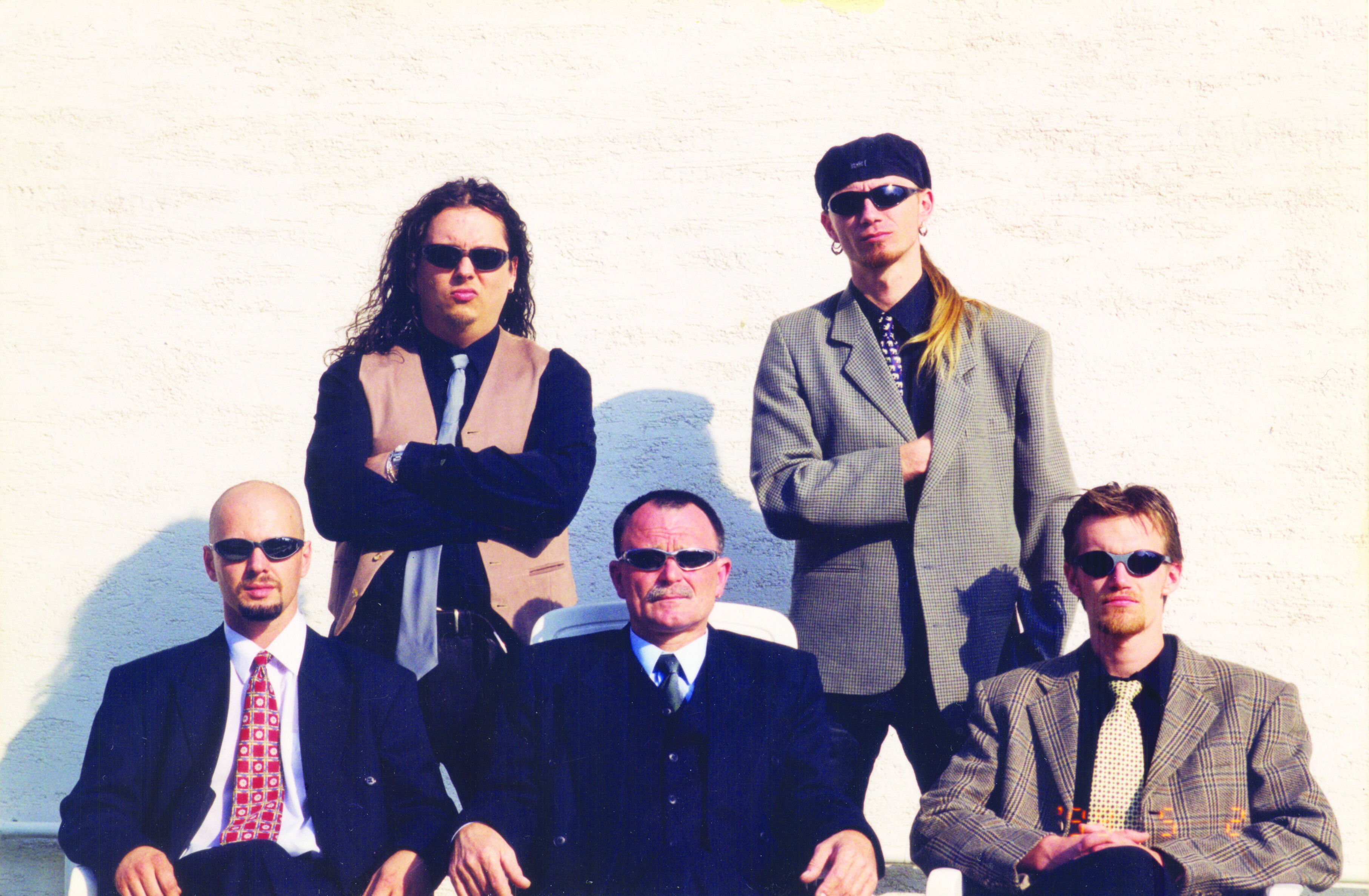 Beatrice:első sor: Székely Károly, Nagy Feró, Fülöp Istvánhátsó sor: Laczik Fecó, Péter Zsolt. Őrbottyán.